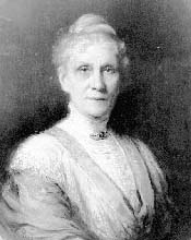 à¹ à¸«à¸¡à¹ˆà¸¡à¹ à¸à¸™à¸™à¸² à¸—à¸µà¹ˆà¸¡à¸²